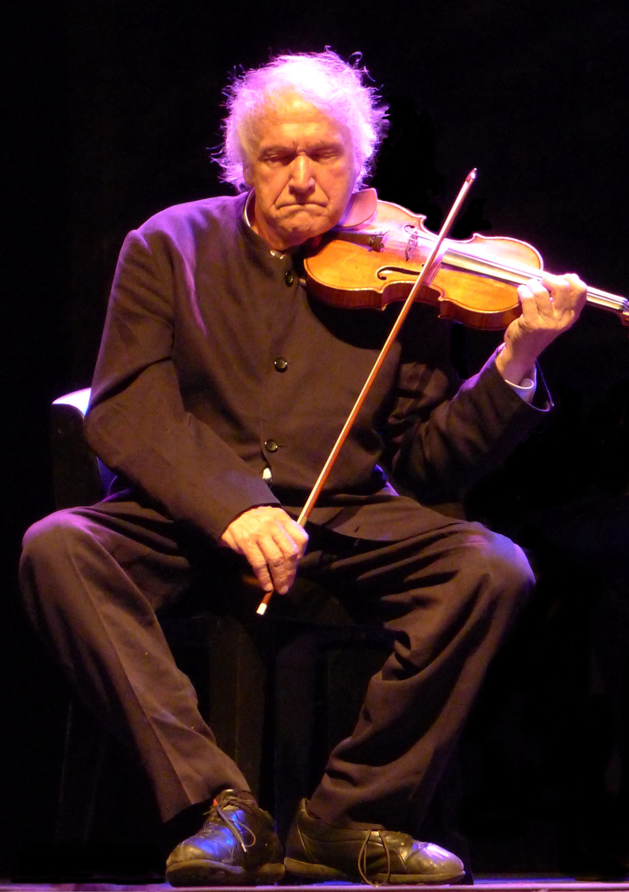 Ivry Gitlis en concert pour l'association Inspiration(s)